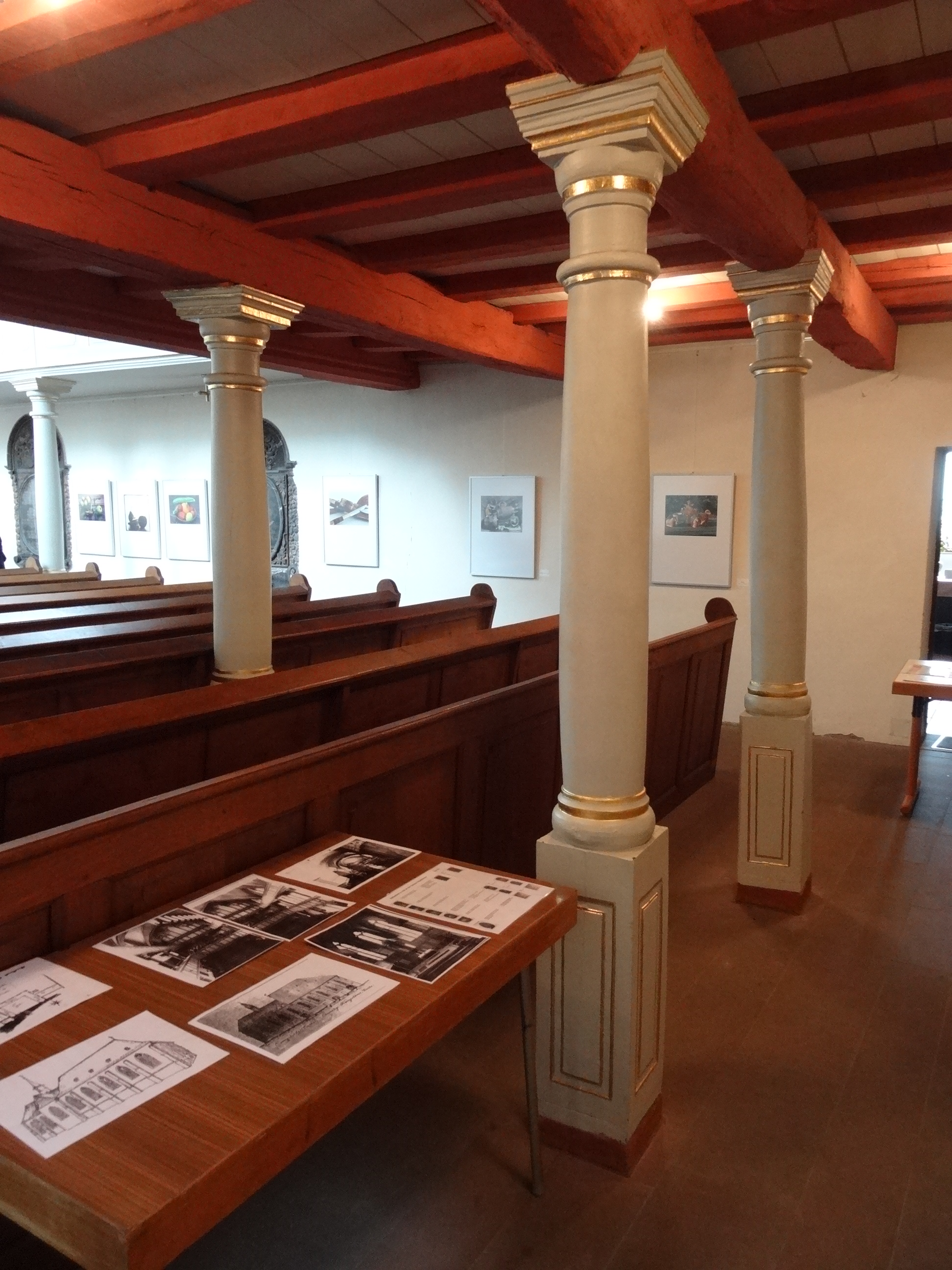 Franziskanerkirche (Wetzlar)